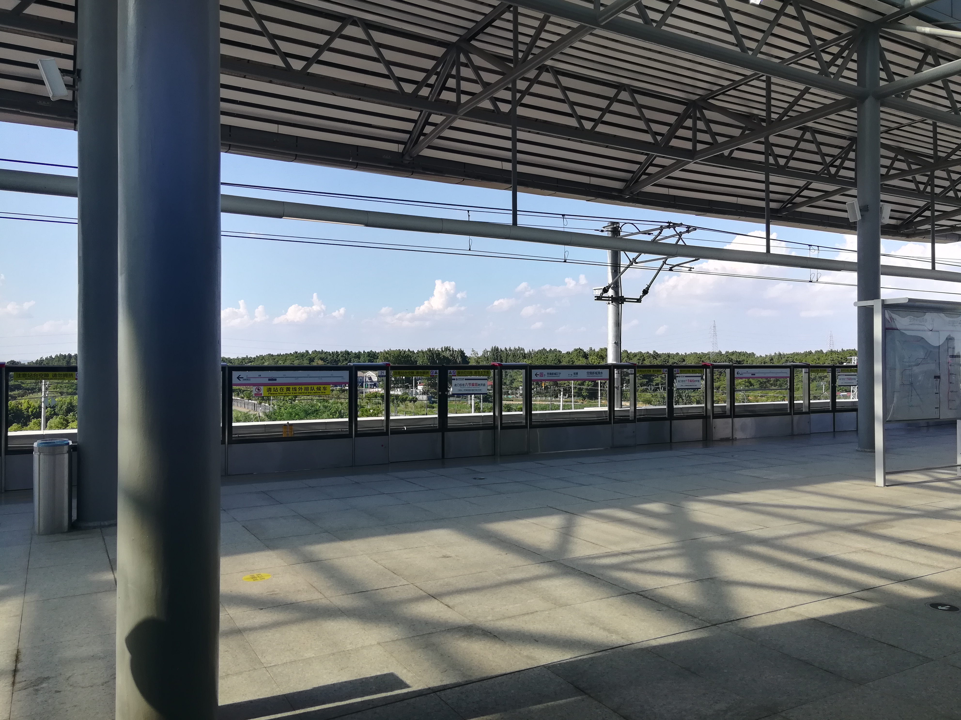 空港新城溧水站